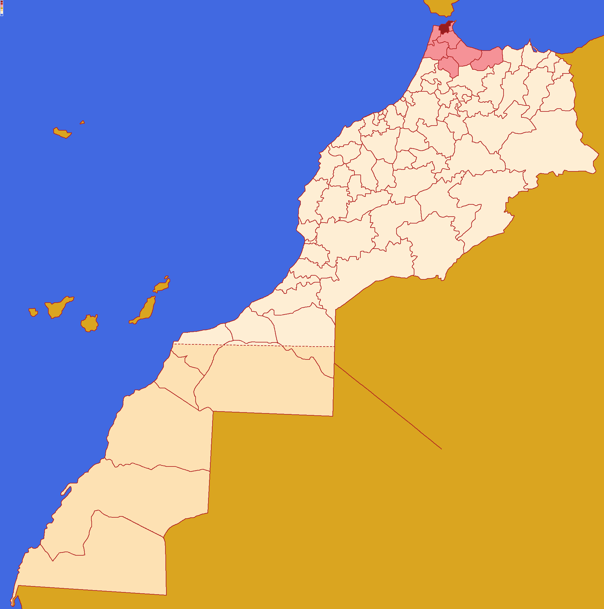 Localização da província de Fahs-Anjra dentro da região de Tânger-Tetuão-Al Hoceïma e dentro de Marrocos. Conforme a reforma administrativa de 2015.